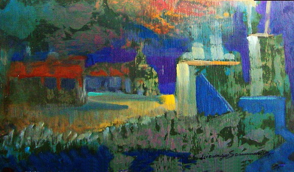 Quadro di Licurgo Sommariva: La città